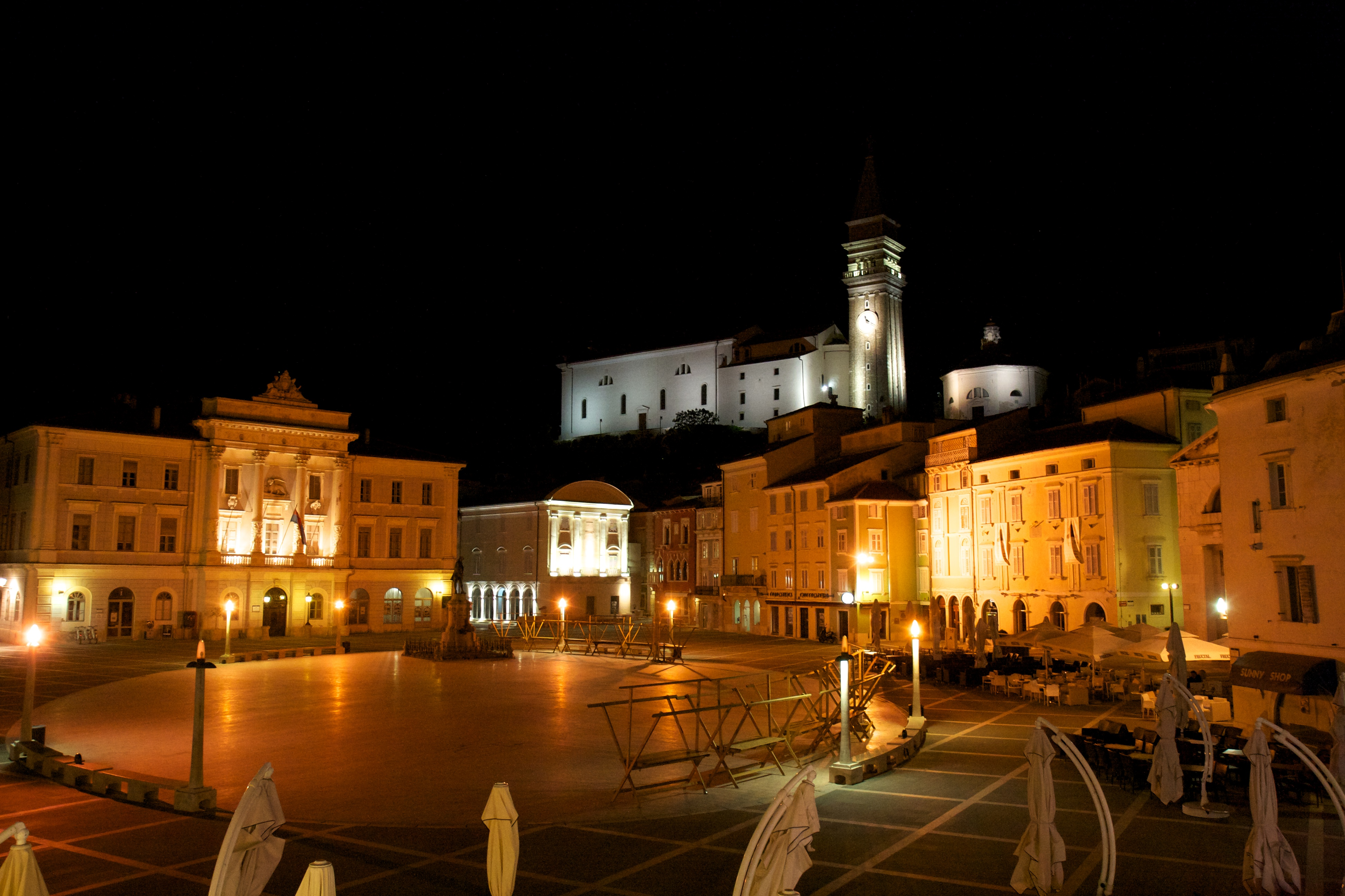 Tartini Square in Piran